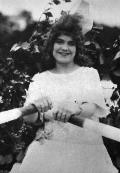 Märta Reiners, née Westholm (1900-1987)